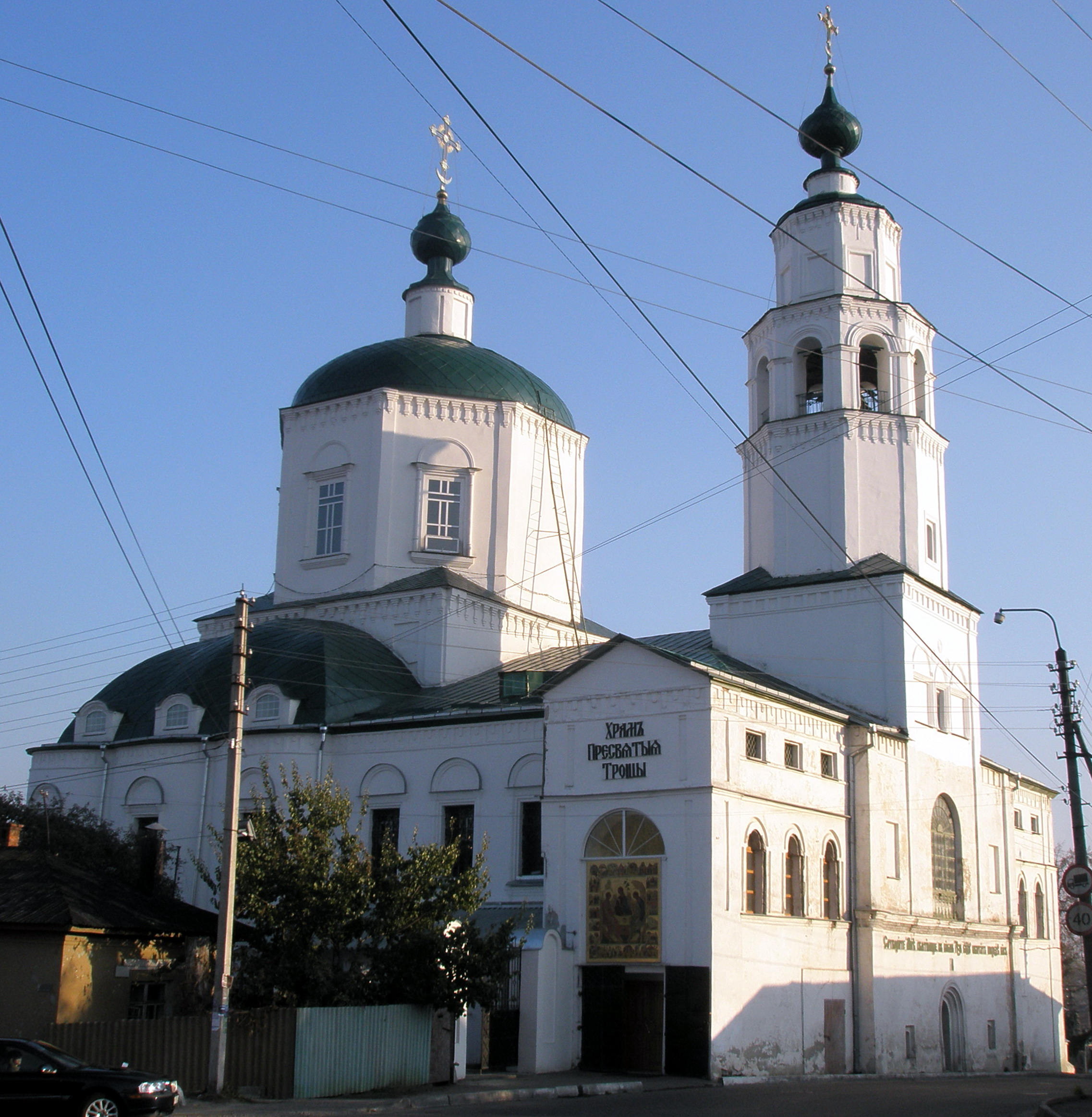 Храм Троицы Живоначальной в Центральном округе города Курска на пересечении улиц Пионеров и Гайдара.